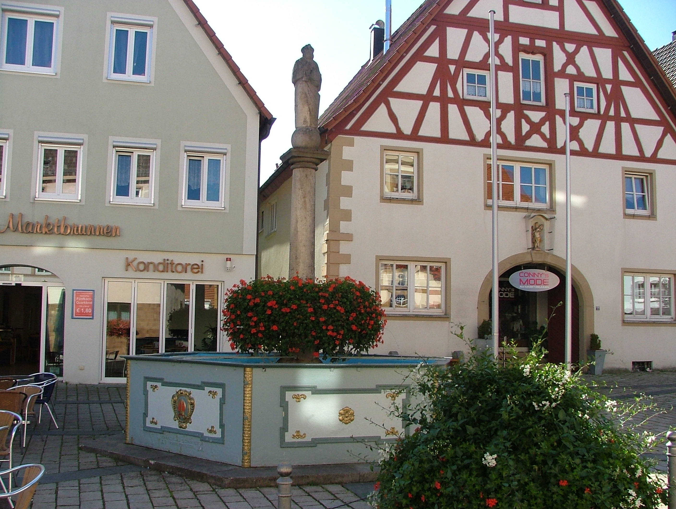 Lauchheim